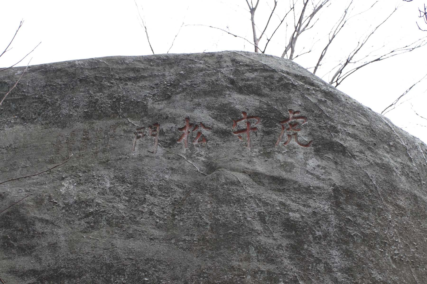 江西庐山月照松林摩崖石刻，九江市文物保护单位